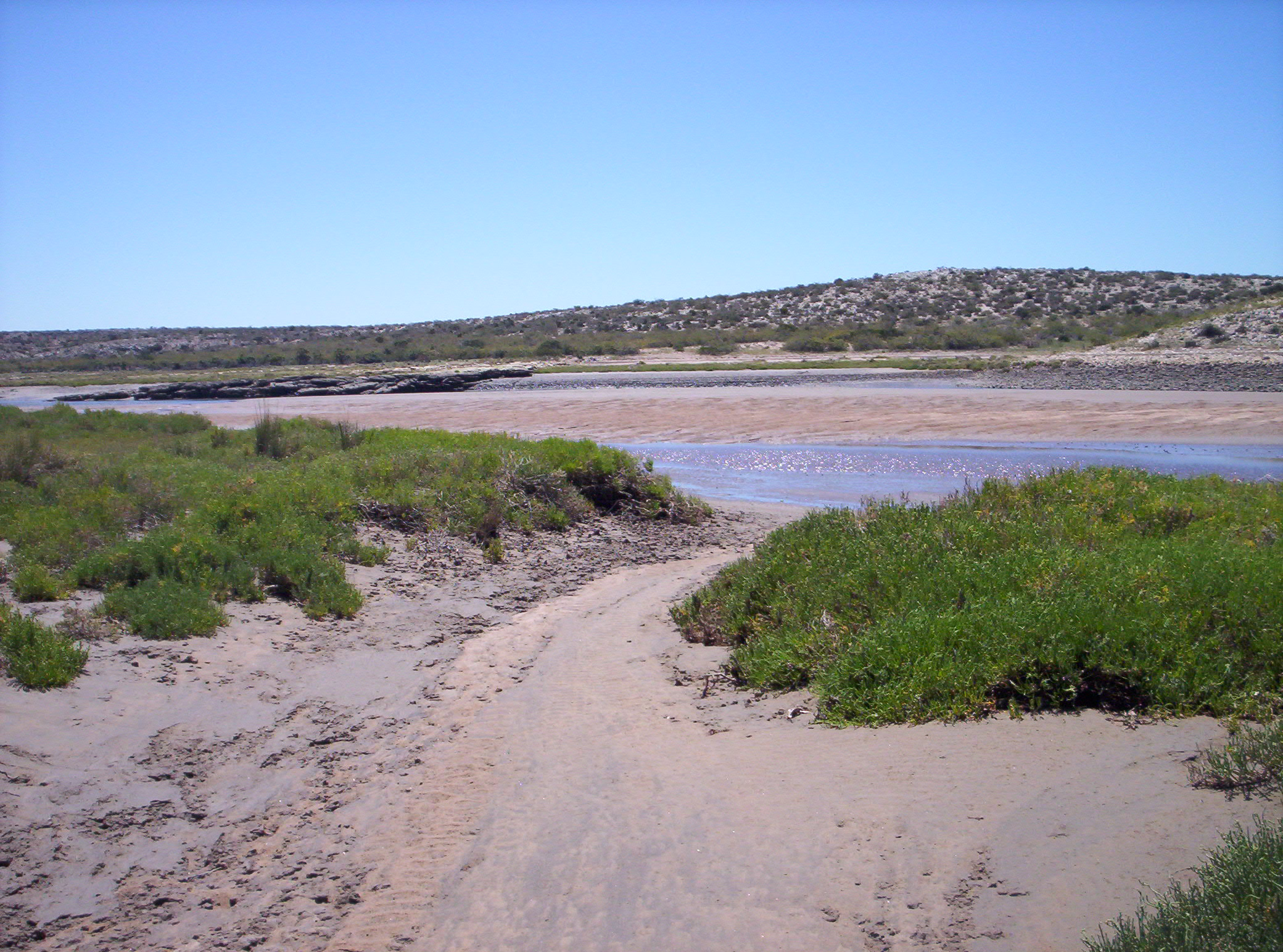 desde el manglar se observa el arroyo en su tramo final